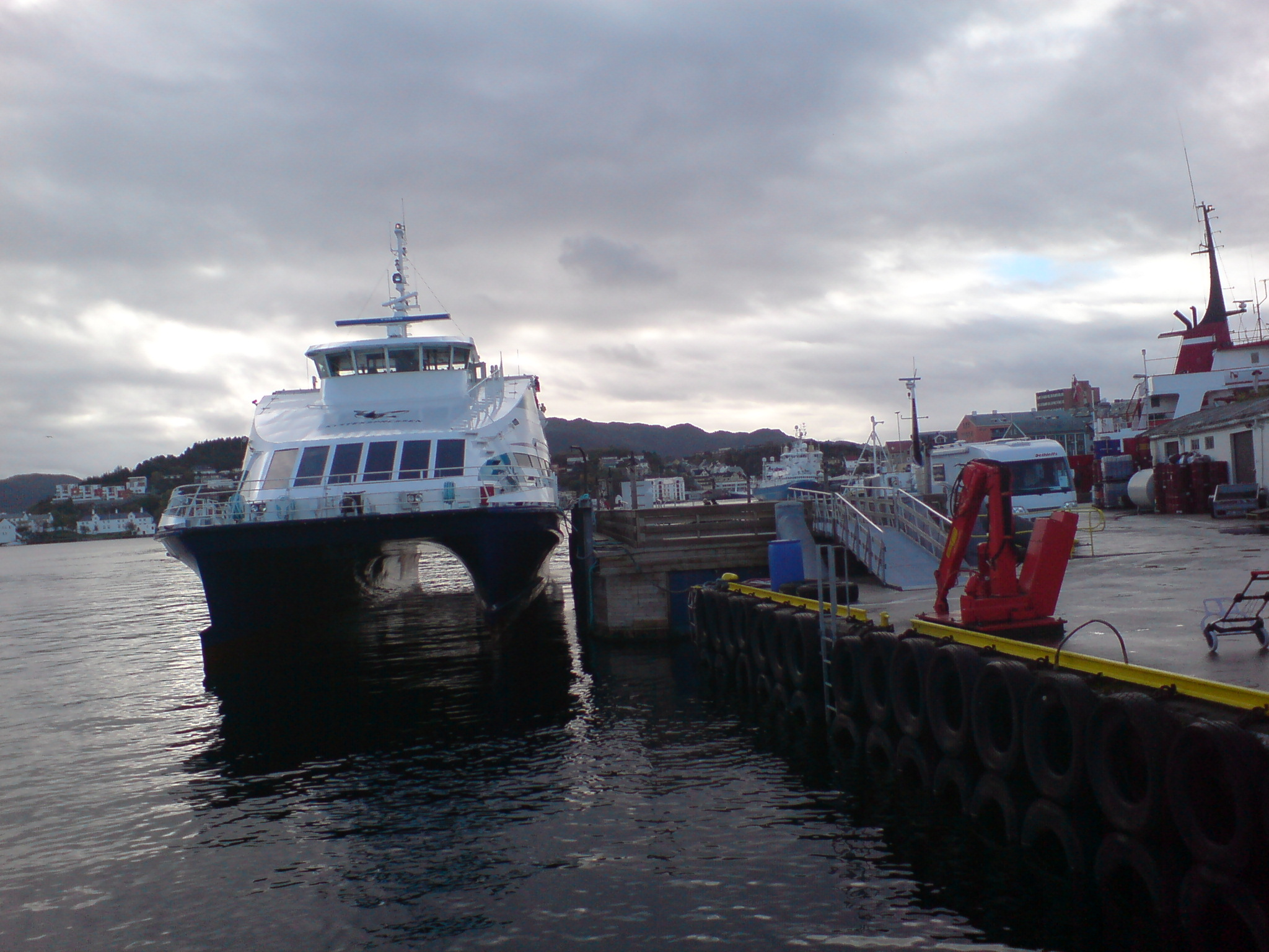 Kystekspressens båt Mørejarl i Kristiansund